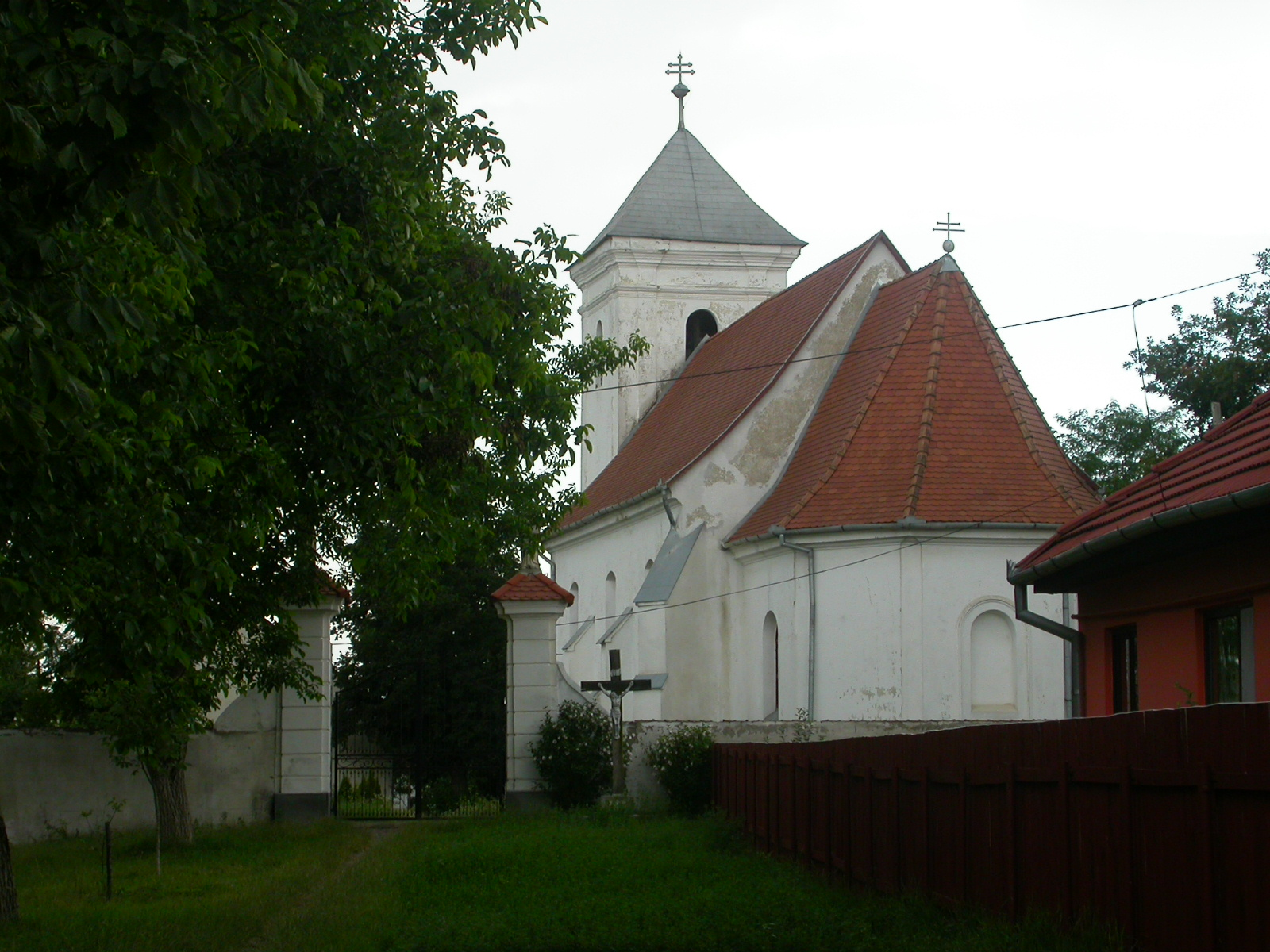 Biserica romano-catolică, sec. XIV - XVIII